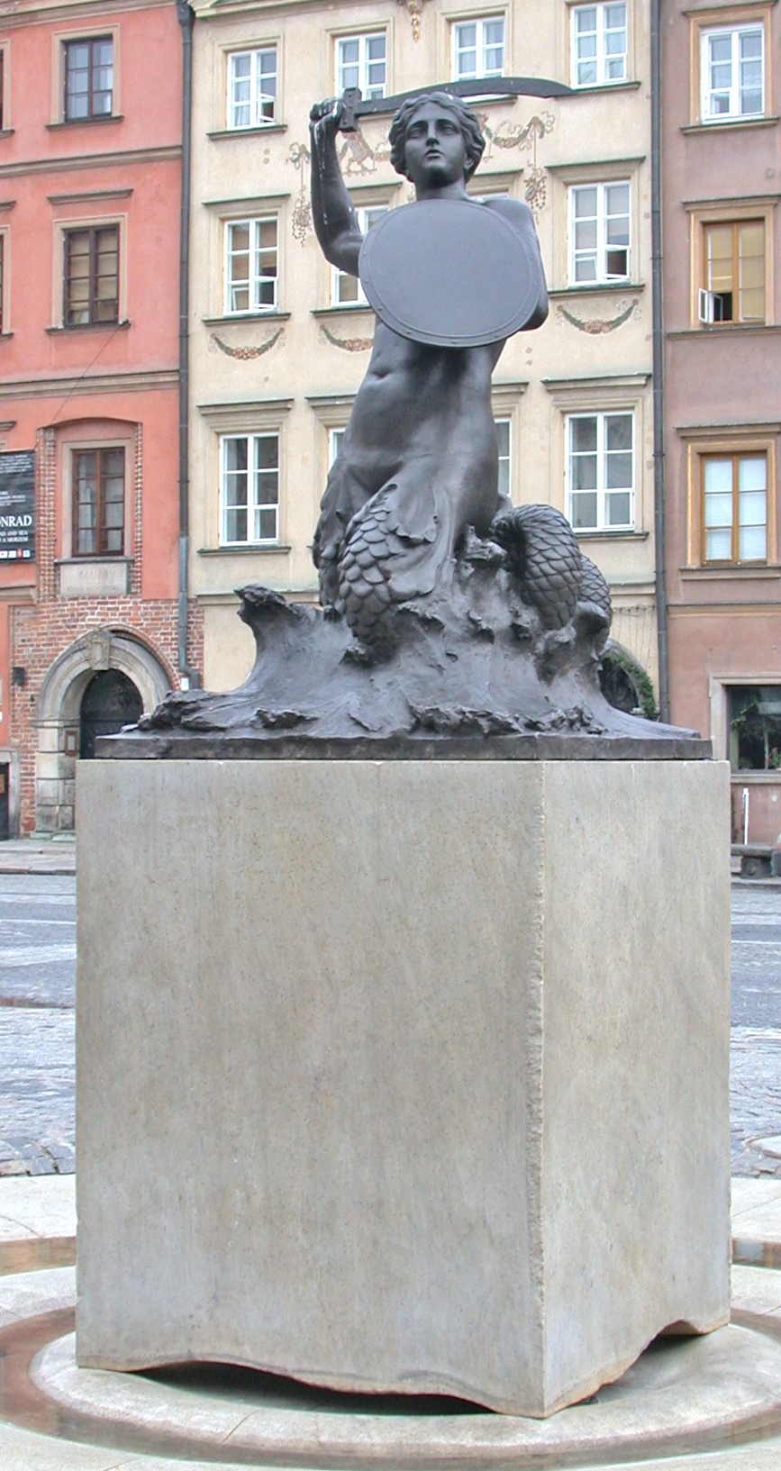 Varsavia, Piazza del Mercato della Città Vecchia (Rynek Starego Miasta), statua della Sirena.